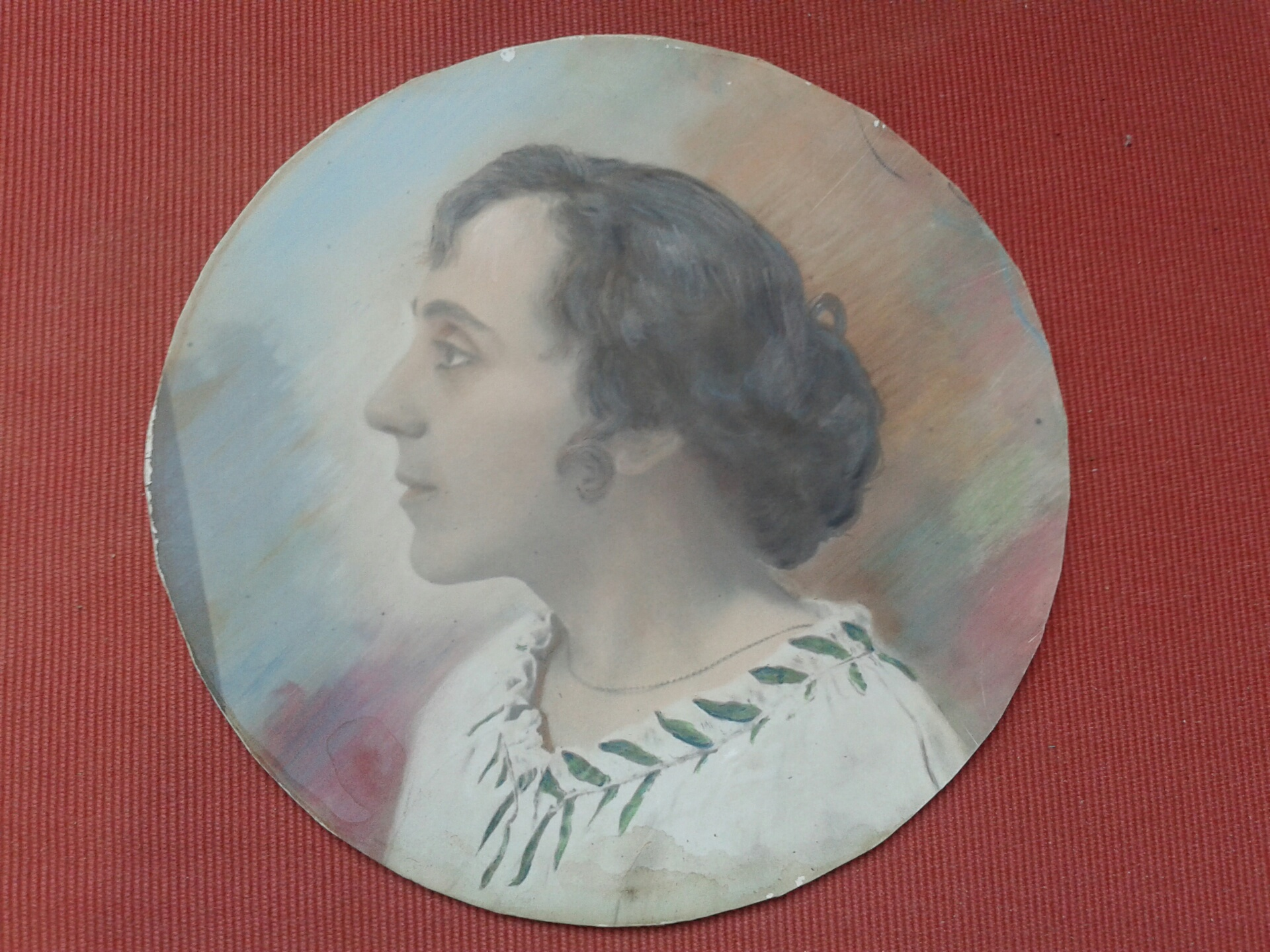 Copia digitale di fotografia cartacea di mia proprietà